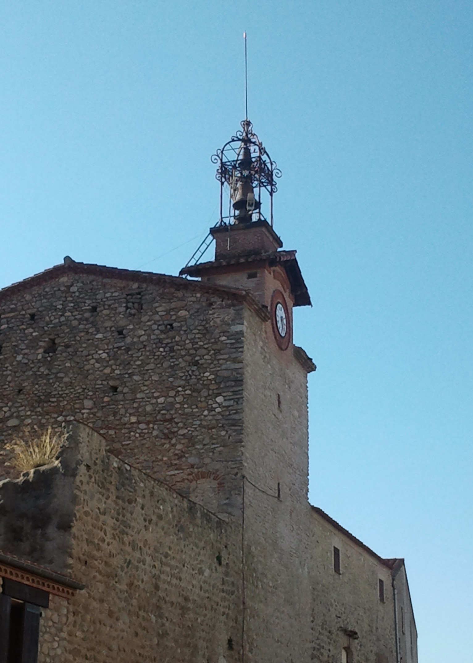 Façade nord-est de l'église Saint-Jean de Saint-Jean-Pla-de-Corts